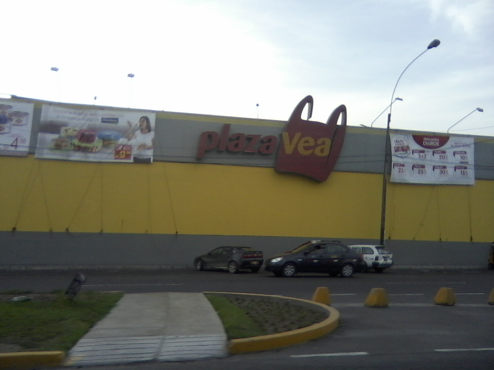 Plaza Vea en el distrito de Surco, Lima.